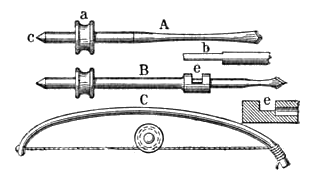 Rollenbohrer (A, B) mit Drill- oder Fiedelbogen (C) a – Rolle b – größerer Bohrer c – Spitze e – Kopfstück